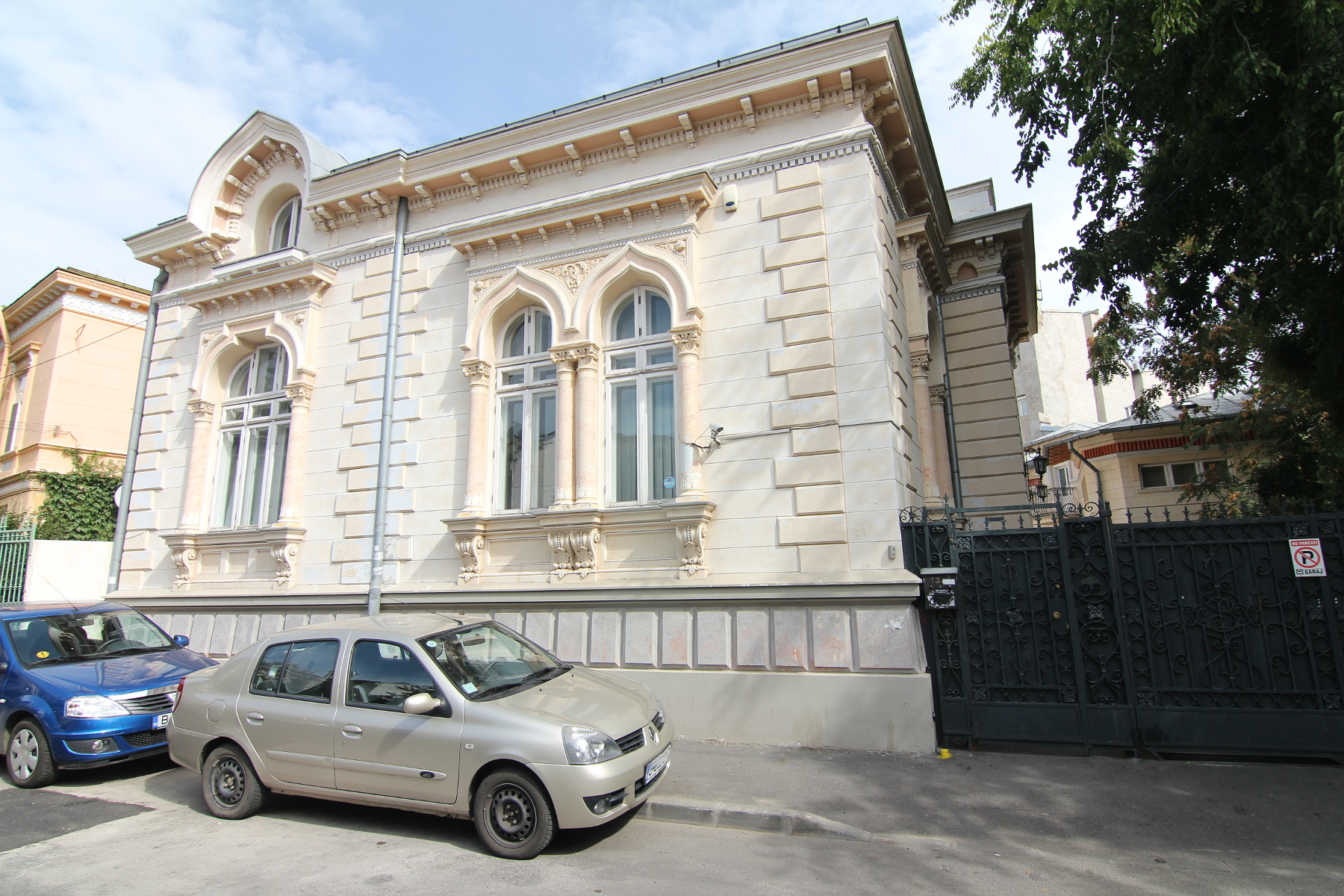 Casă pe Radu Calomfirescu